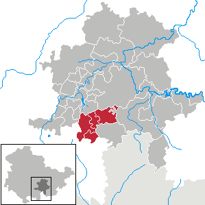 Verwaltungsgemeinschaft Lichtetal am Rennsteig in Thuringia - District Saalfeld-Rudolstadt